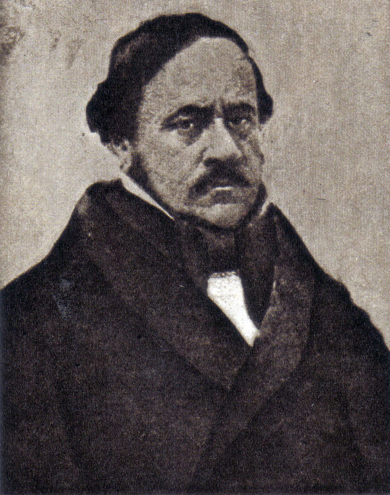 José Zapiola Cortés (Santiago de Chile, 1802 - † íd., 1885) fue un compositor chileno, destacándose su aporte a la cultura de la ciudad de Santiago.